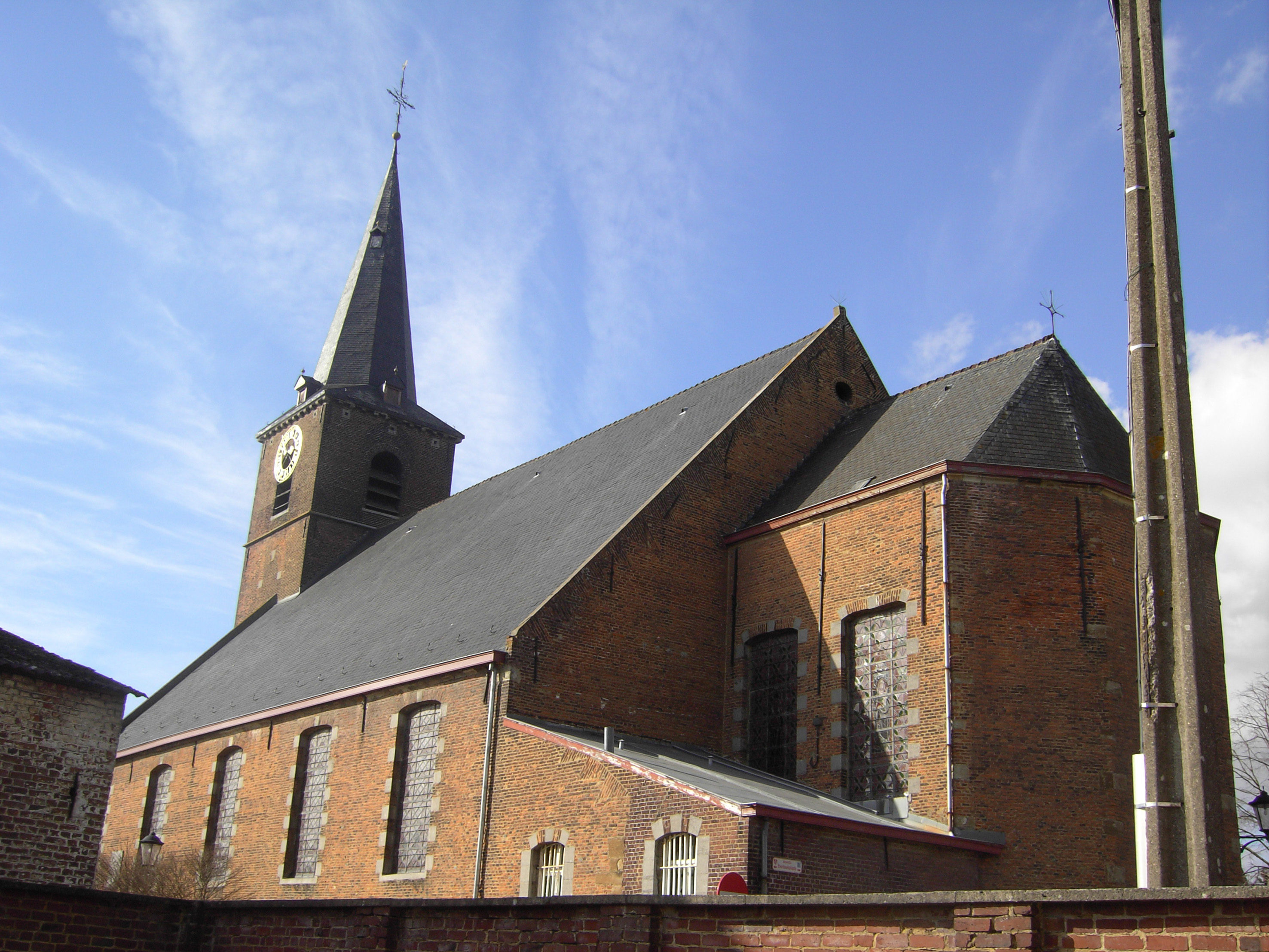 Everbeek-Beneden - Everbeek - Brakel - Oost-Vlaanderen - België: kerk